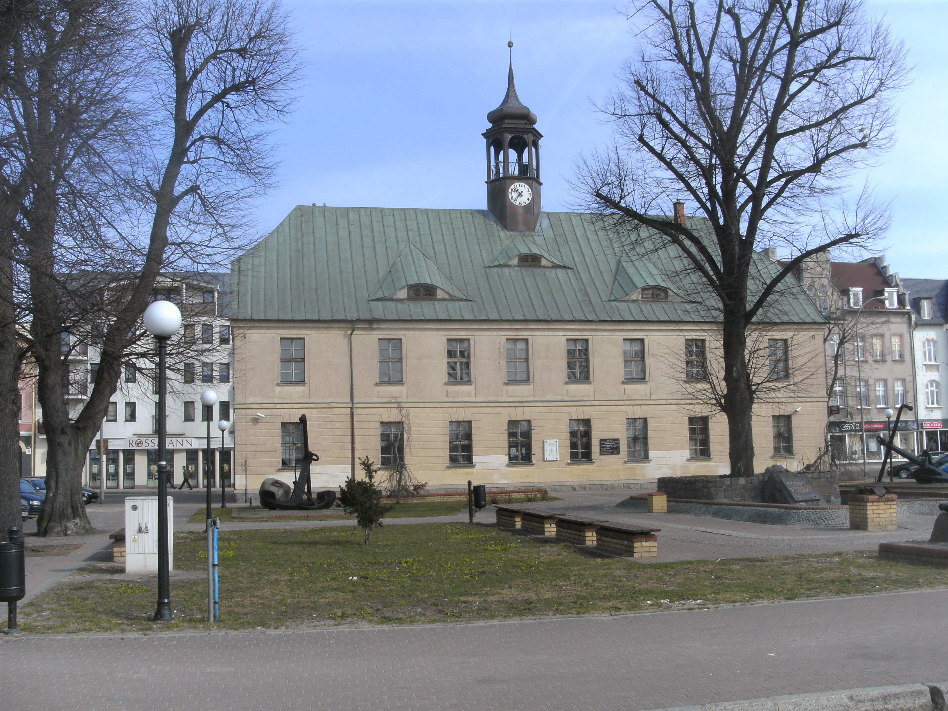 Świnoujście, pl. Rybaka 1 (zarząd miasta, obecnie Muzeum Rybołówstwa Morskiego)